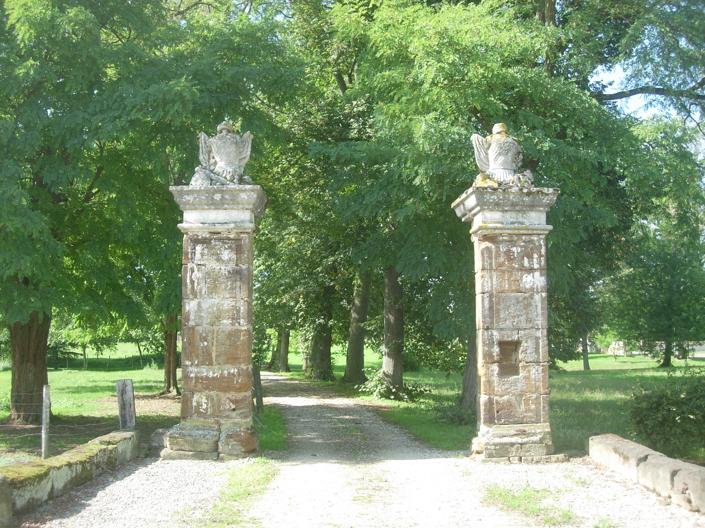 Entrée du chateau de Fuligny (Aube)